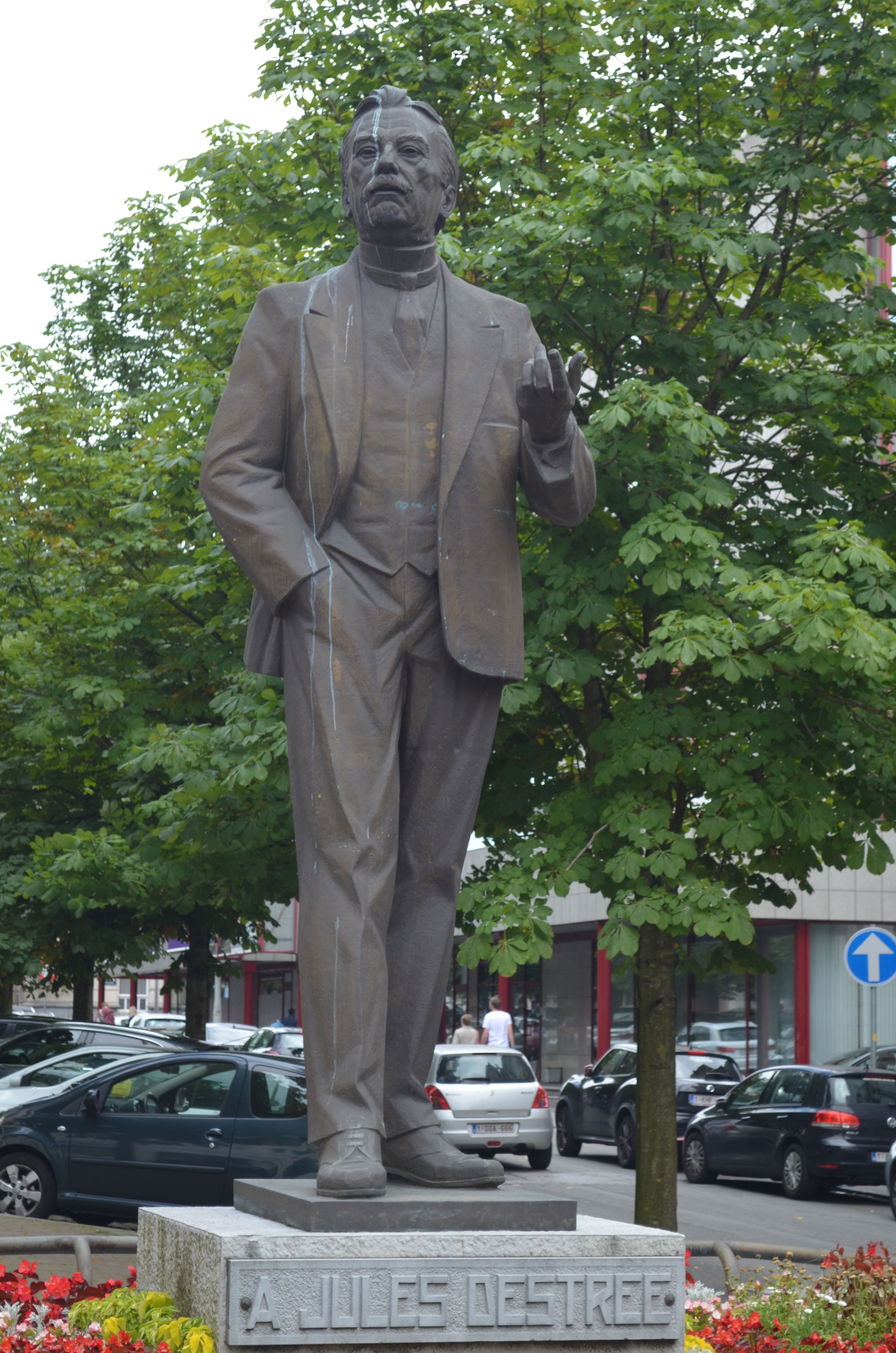 Depicted person: Jules Destrée